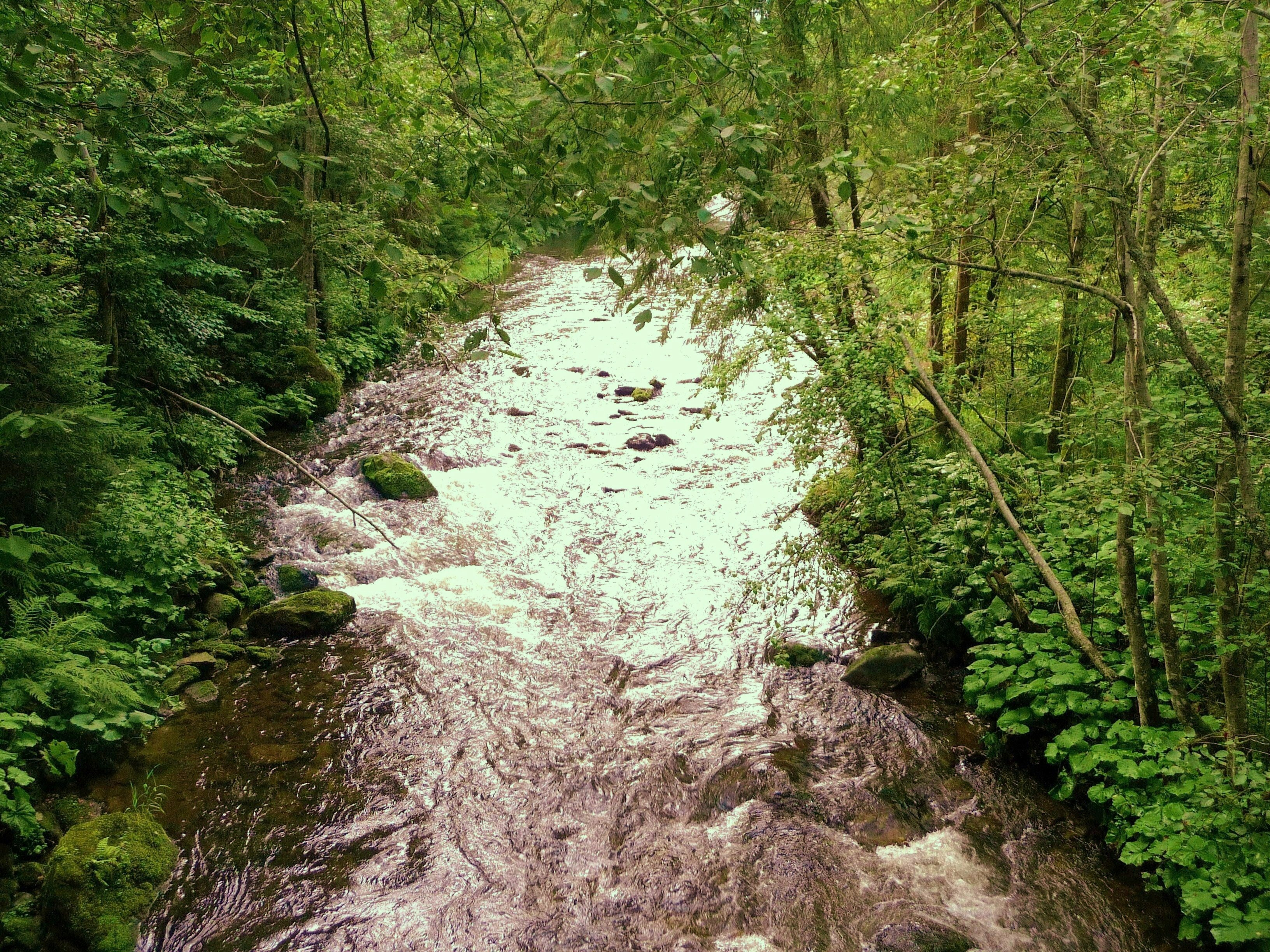 Der Große Regen bei Ludwigsthal